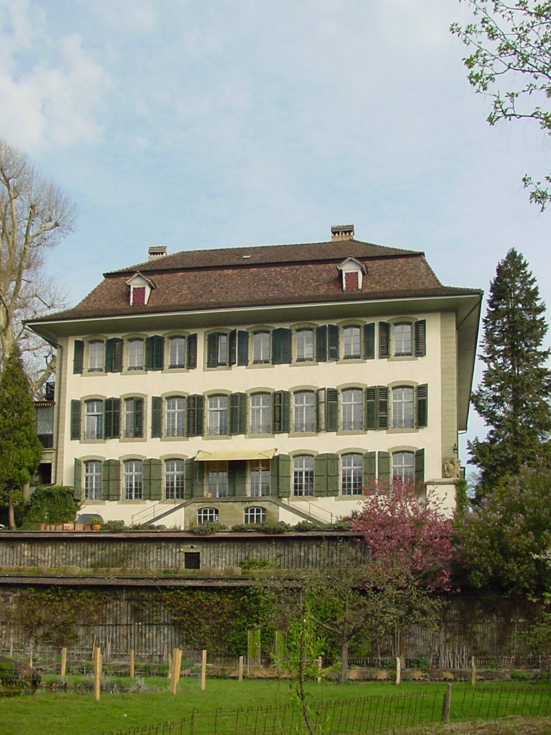 Schloss Reichenbach in Zollikofen, Bern, Schweiz